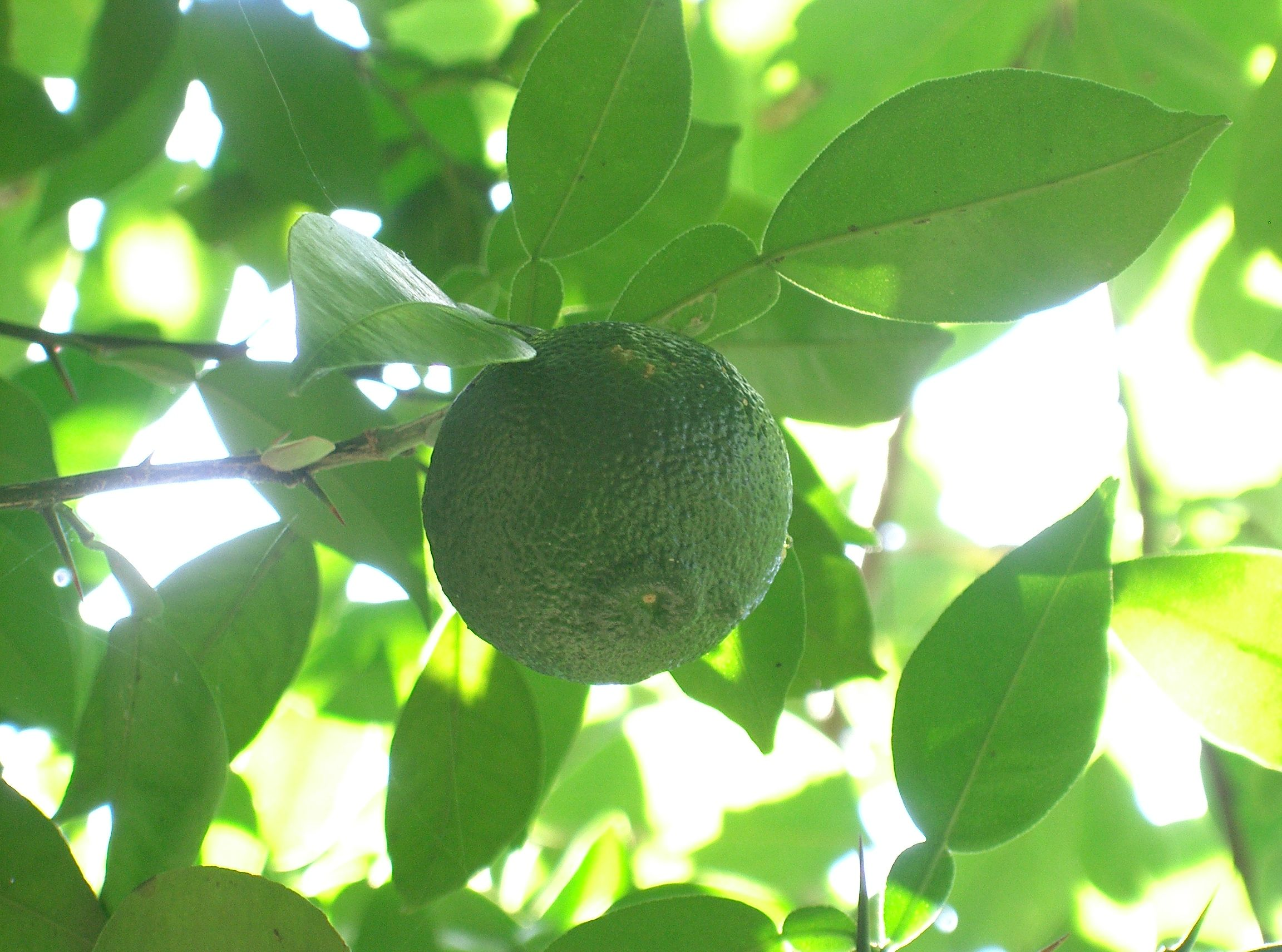 Citrus junos